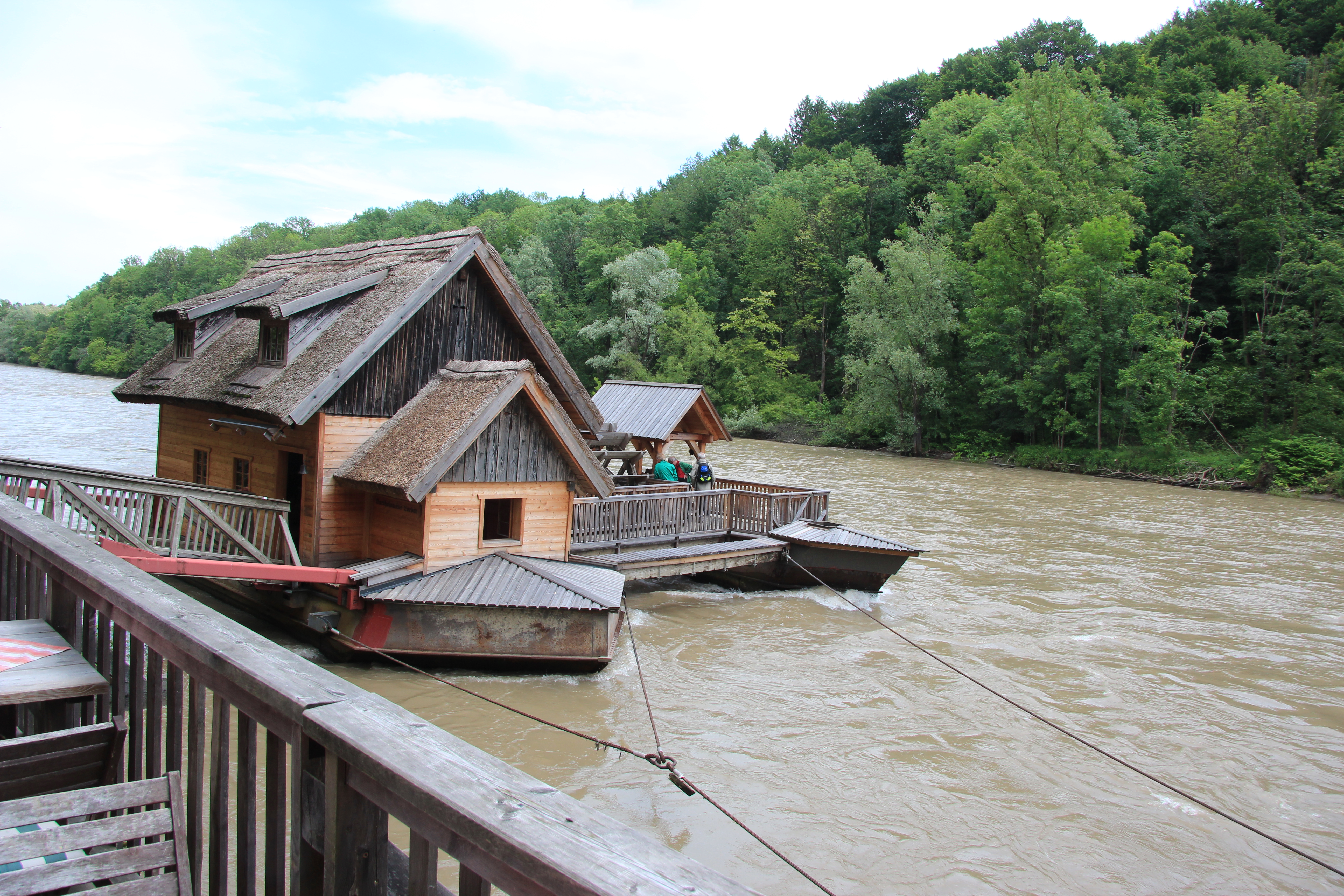 Schiffsmühle auf der Mur bei Mureck, Steiermark